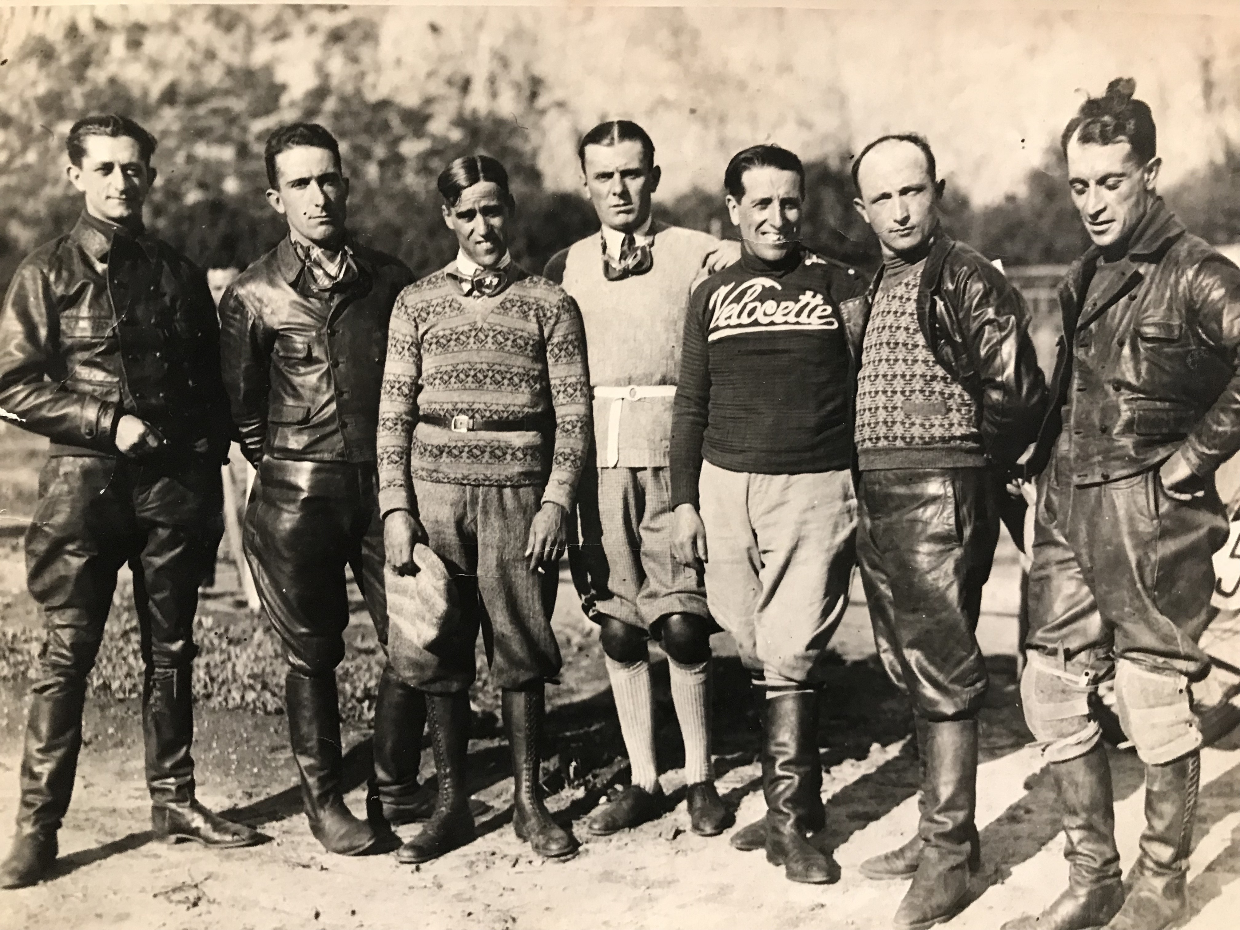 Foto di gruppo di alcuni piloti tra cui: Mario Colombo, Achille Varzi e Tazio Nuvolari.